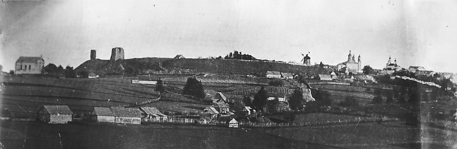 Беларуская (тарашкевіца): Наваградак (Navahradak)